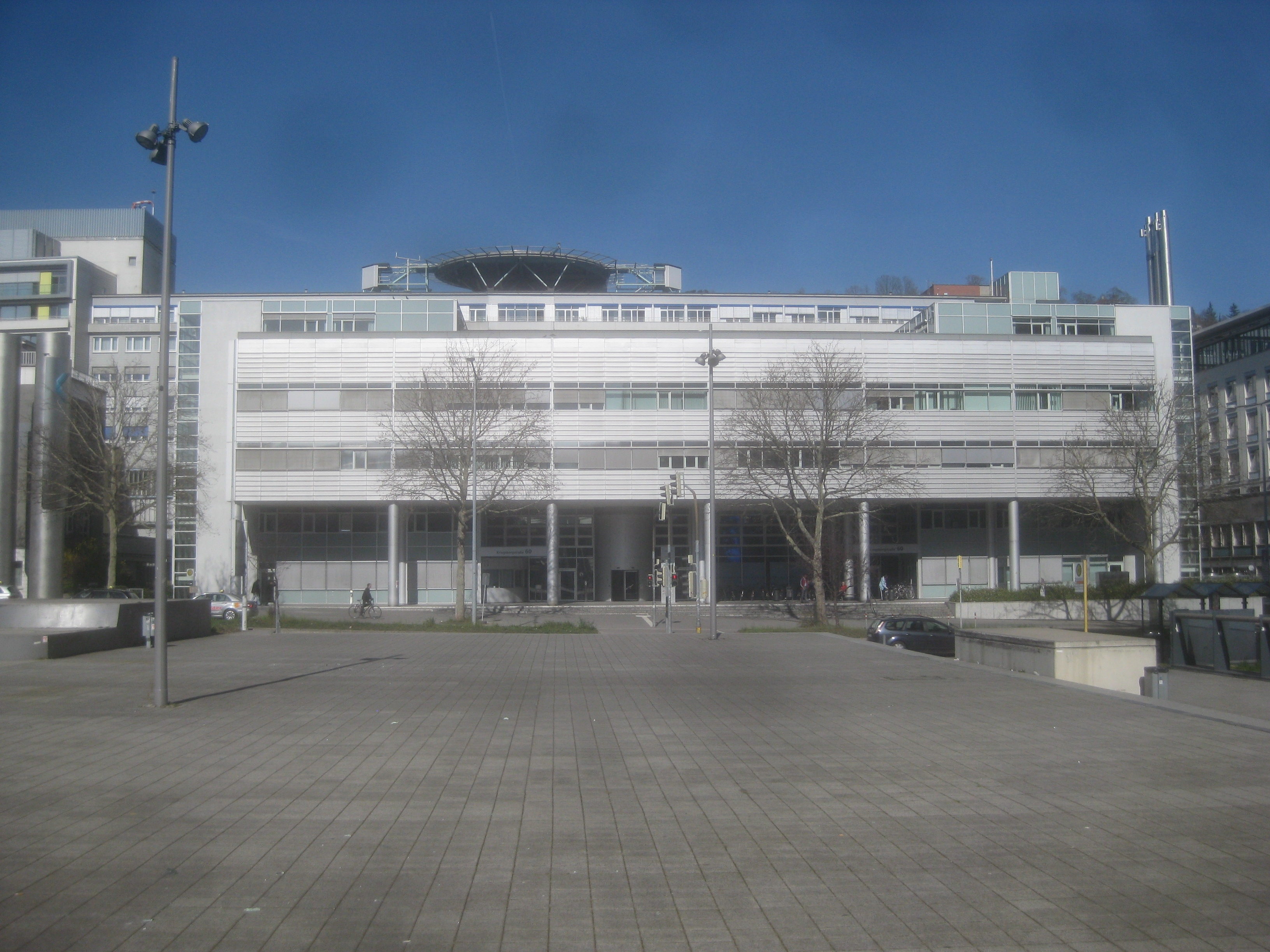 Katharinenhospital Stuttgart, Haus E, Kriegsbergstraße 60. Ansicht von Süden (Stadtgarten).